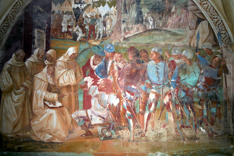 Come Benedetto discopre la finzione di Totila, by Luca Signorelli, Monte Oliveto Maggiore